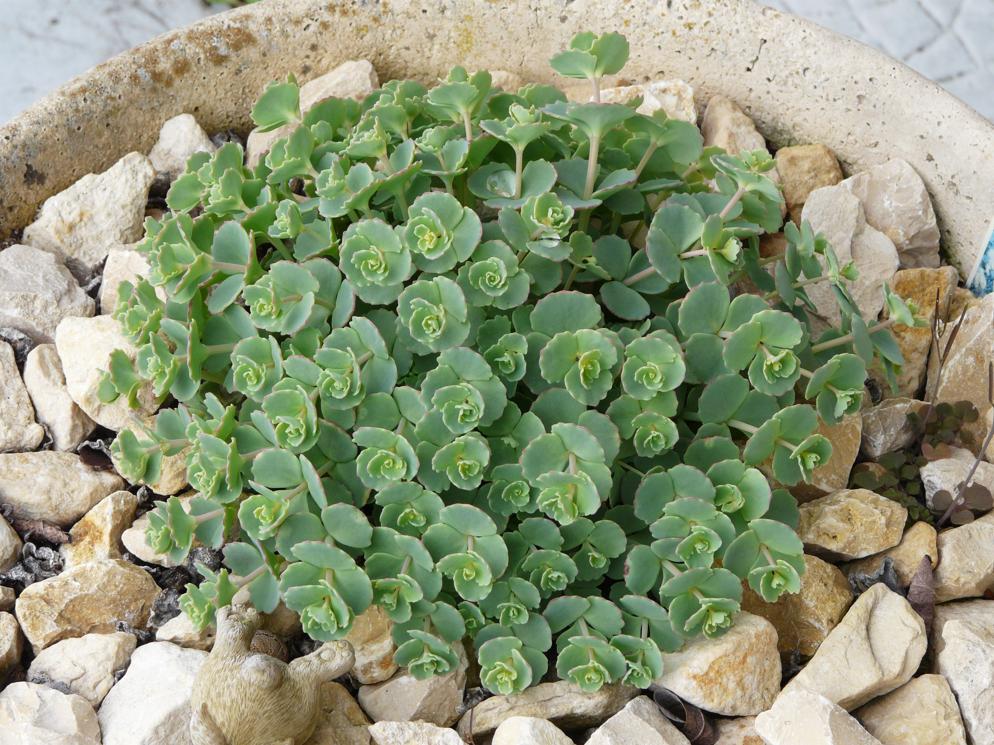 Sedum sieboldii, Dordogne, France.